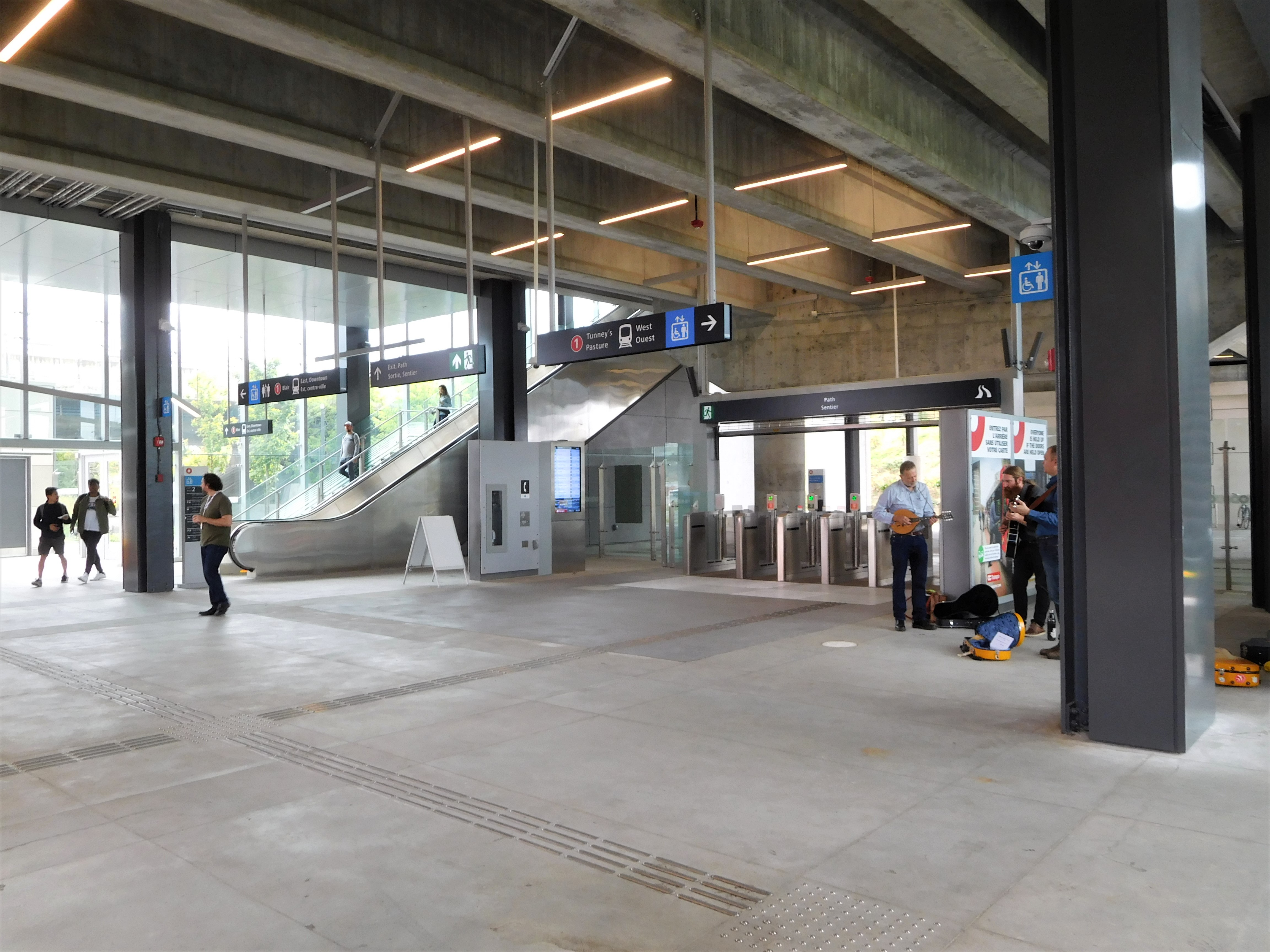 Station Bayview à Ottawa